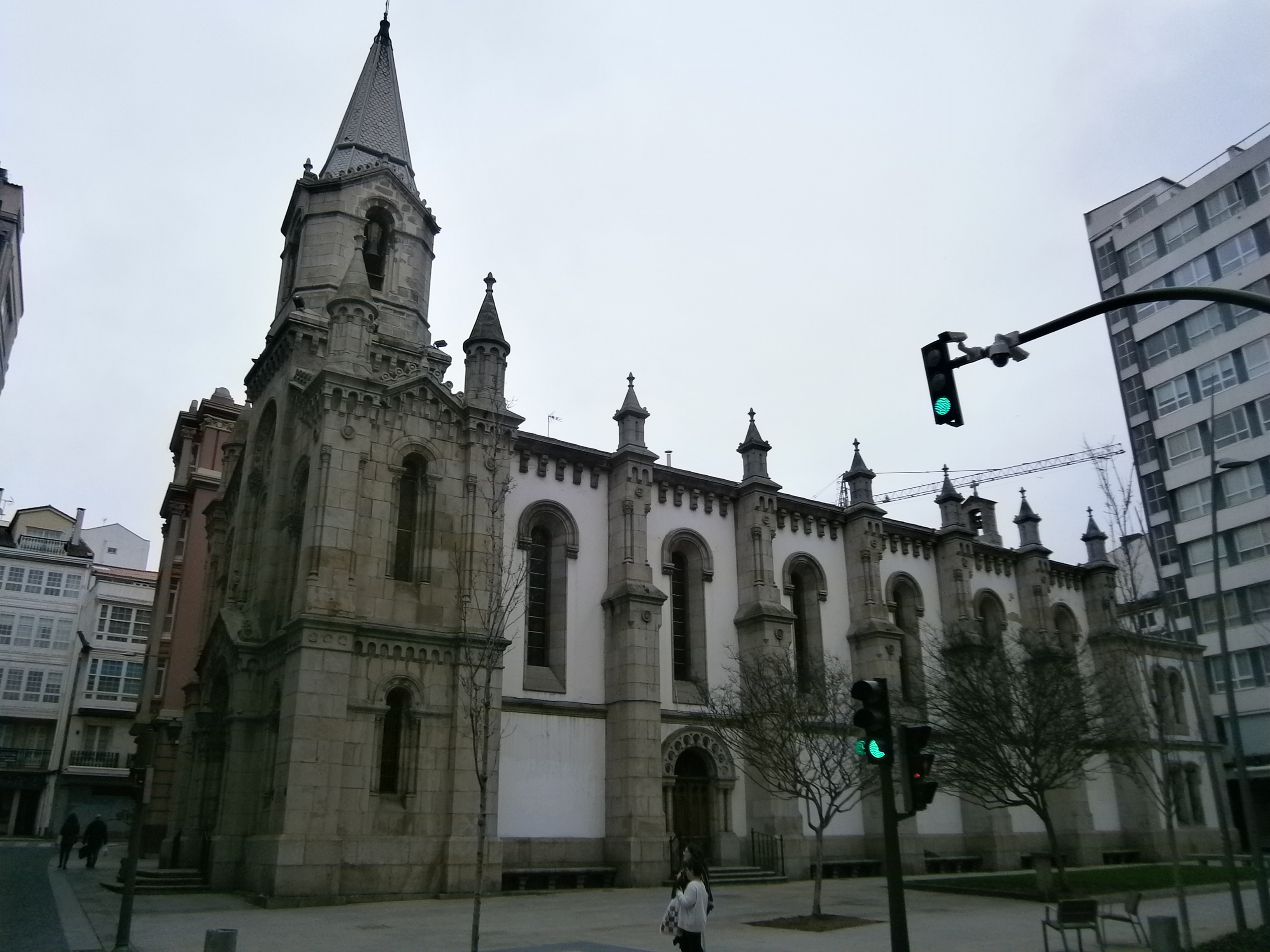 Igrexa de Santo André (A Coruña)